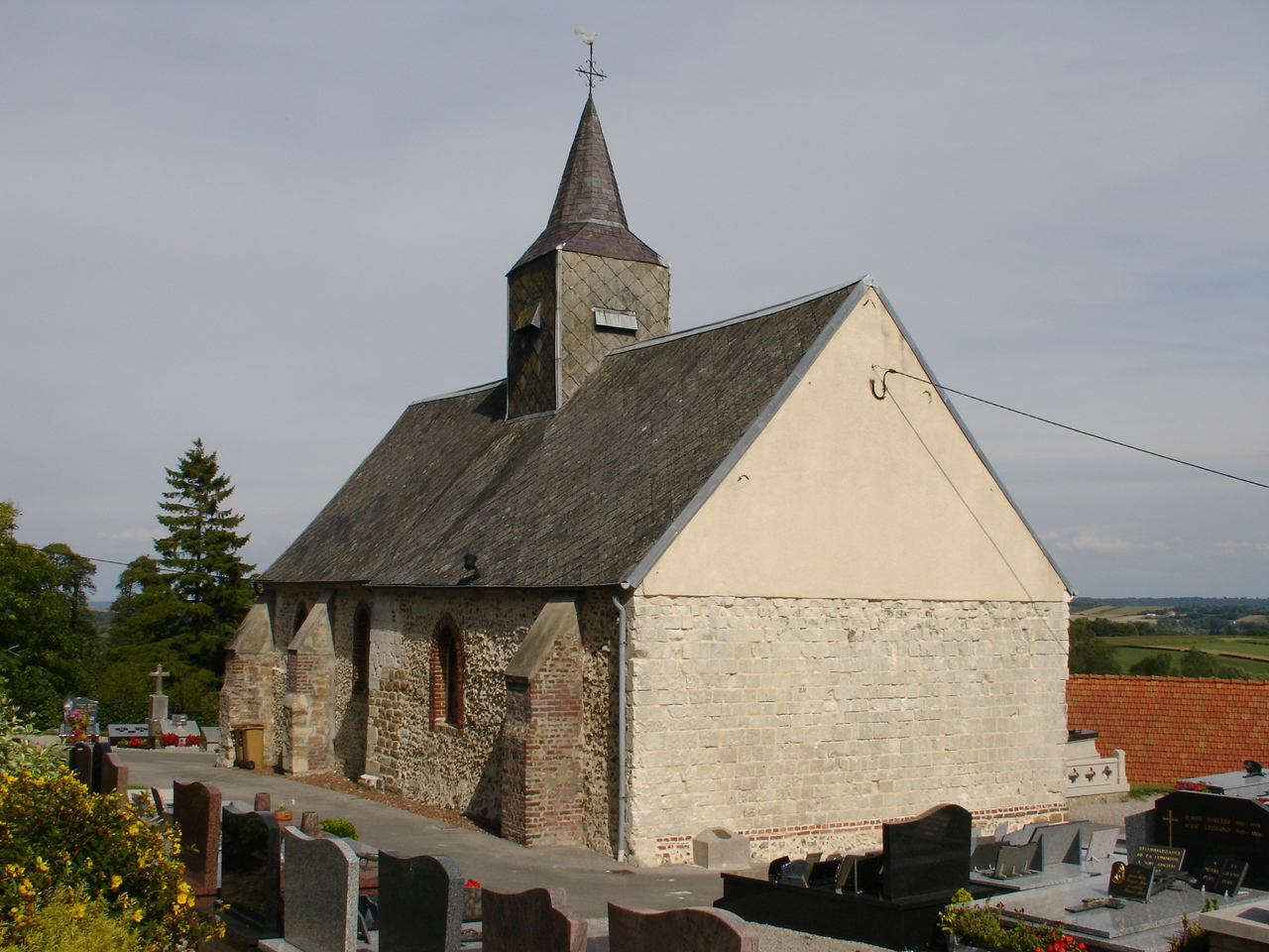 Église de Bainghen